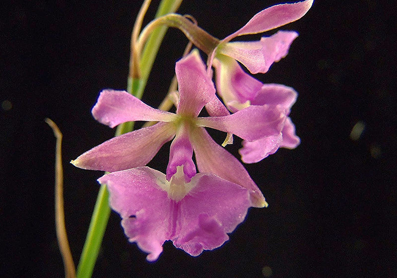 Epidendrum campestre. Esta foto e de uma planta de minha coleção particular